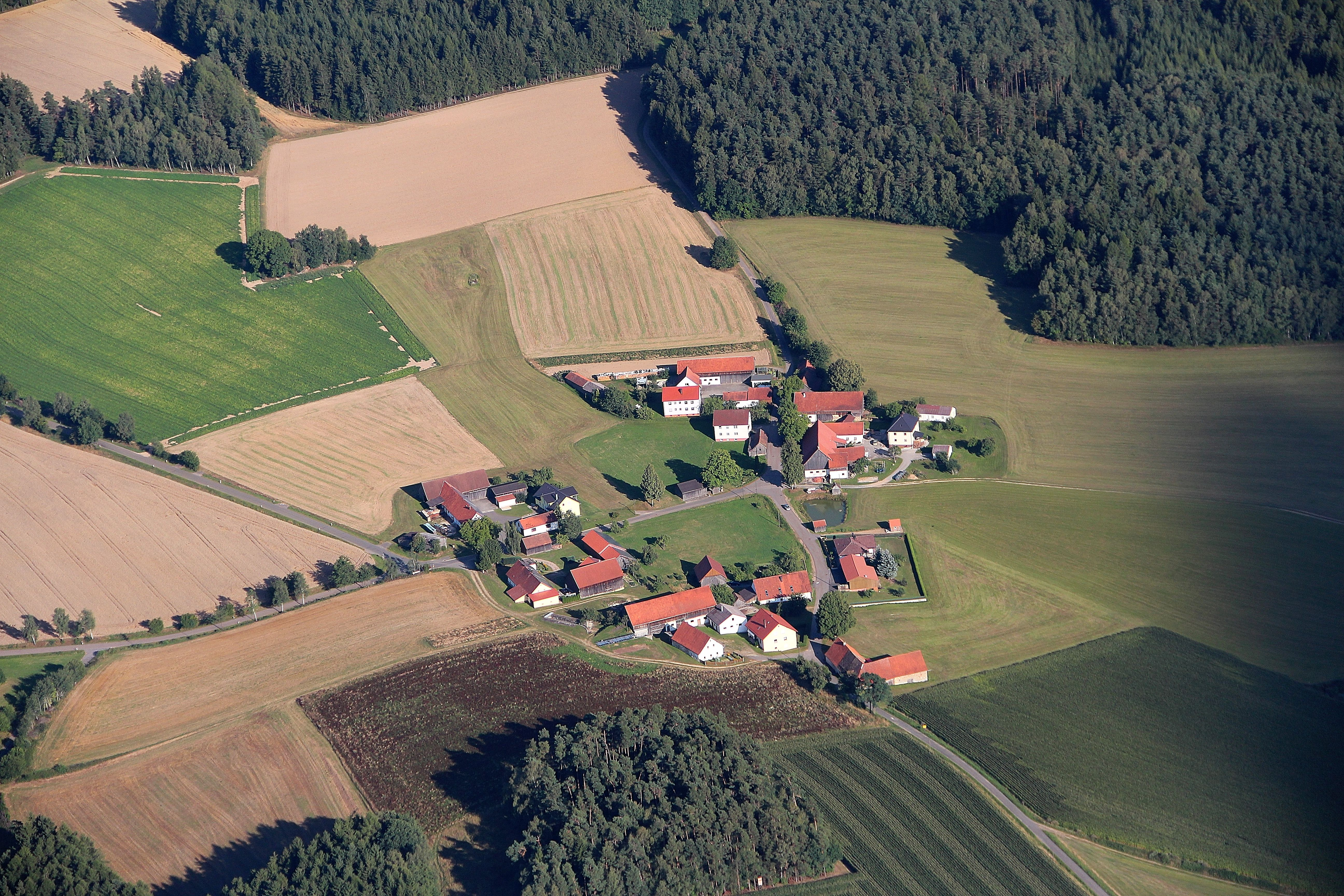 Mantlarn, Gemeinde Niedermurach, Landkreis Schwandorf, Oberpfalz, Bayern